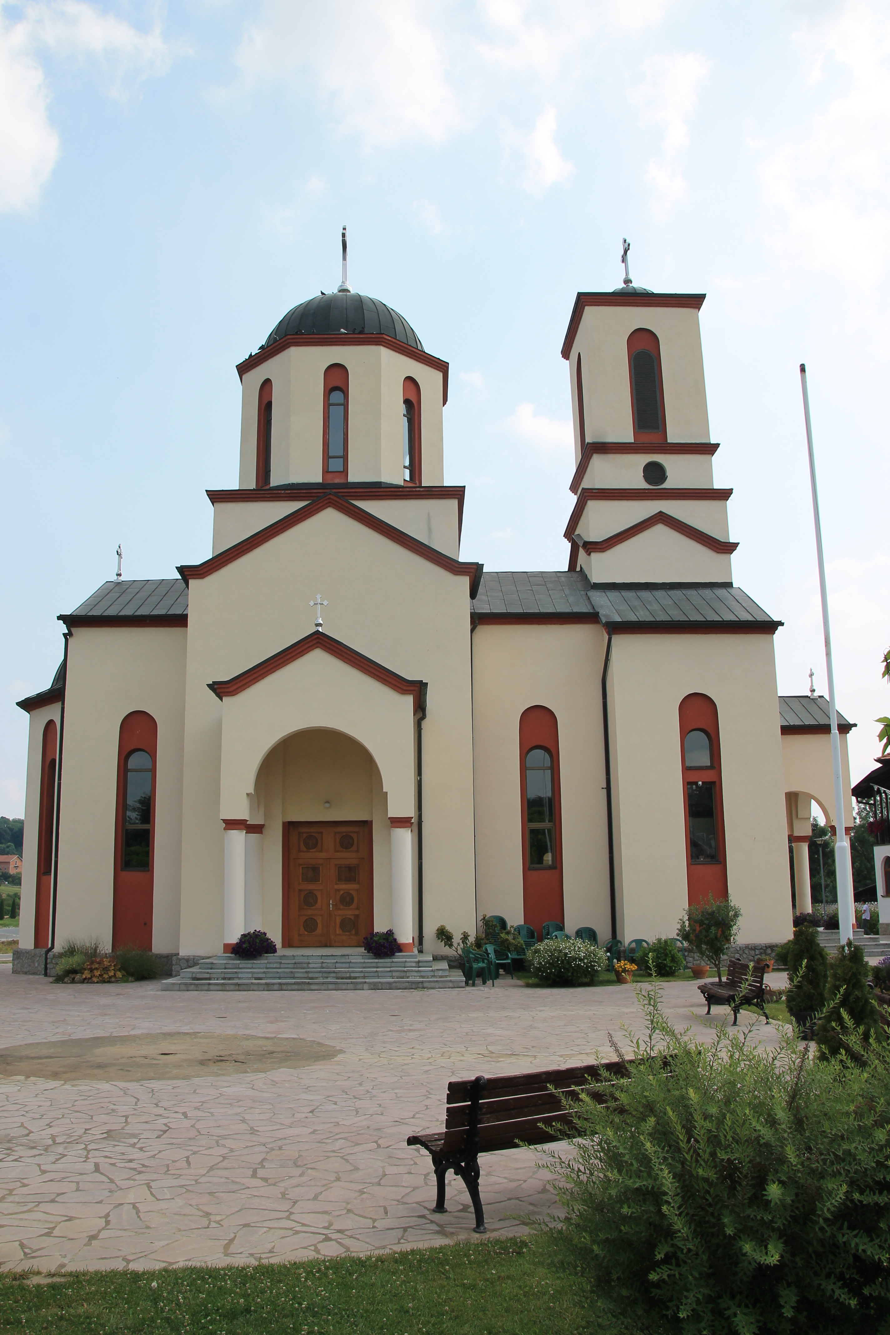 Crkva Sv. Save (Barajevo)